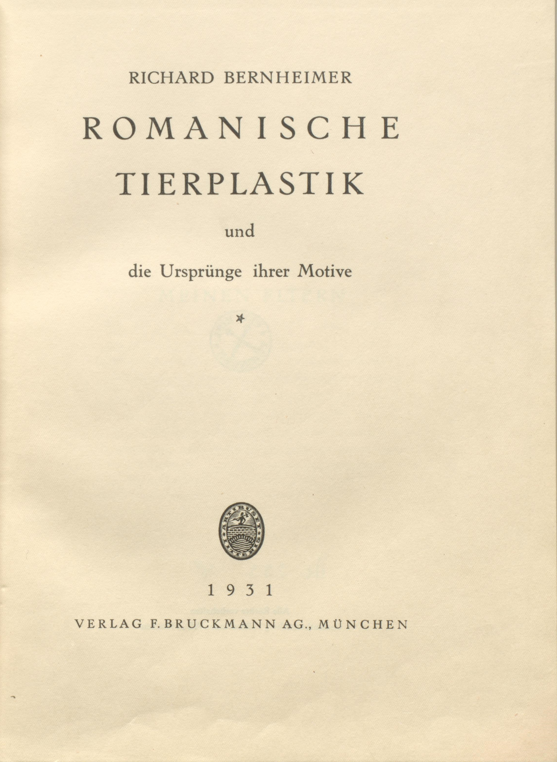 Richard Bernheimer Romanische Tierplastik und die Ursprünge ihrer Motive. München : F. Bruckmann, 1931